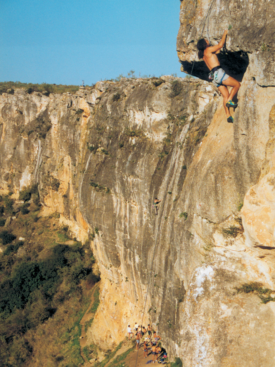 Escalada en "Patones" [Los escaladores suelen denominar "Patones" a la zona de escalada situada en la cara norte de la ceja caliza de Patones. No obstante, la mayoría de las vías que merecen este nombre (como la de esta foto) están en la localidad limítrofe de Alpedrete de la Sierra